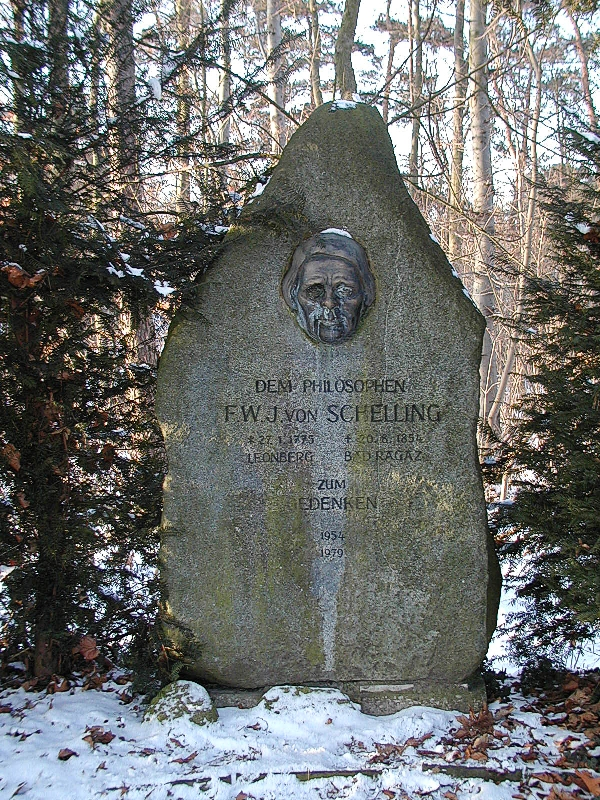 Friedrich Wilhelm Schelling Gedenkstein in Leonberg